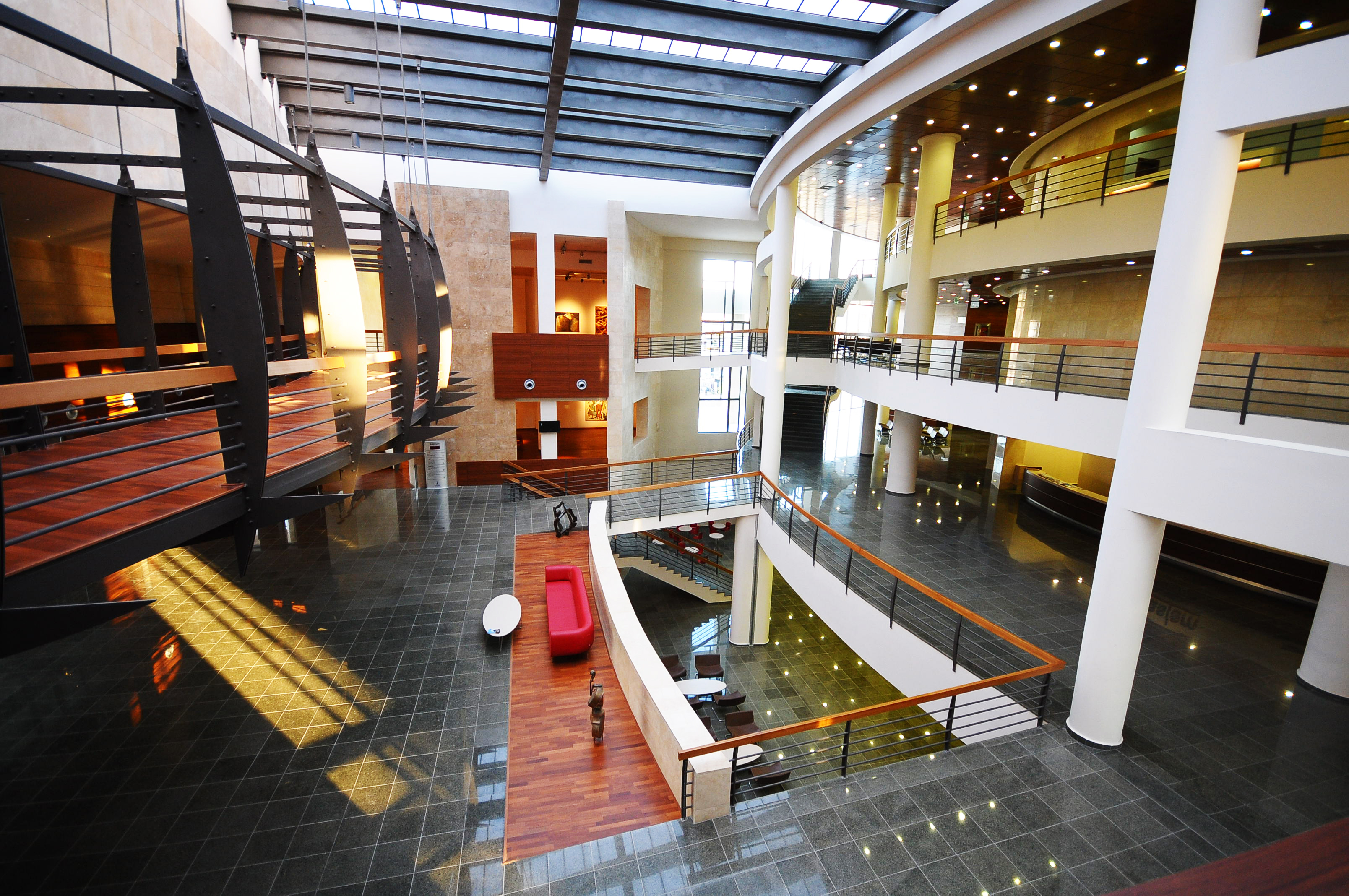 Main entrance and suspended bridge on the left, floor balconies and and double height space to basement can be seen on right.Art galleries on ground and 1st floor is right across